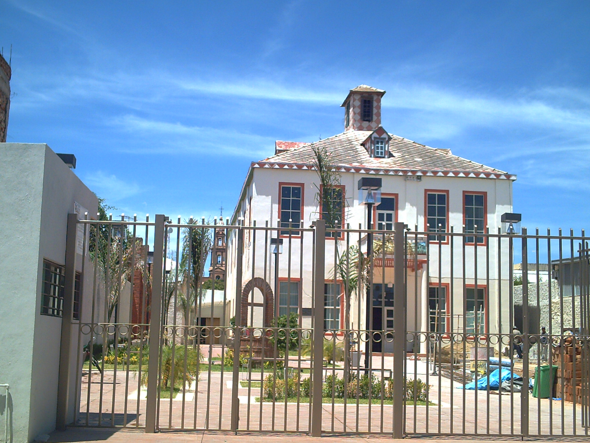 Construcción antigua conocida como "El anillo de hierro", actualmente se encuentran ahí el Archivo Histórico y el Museo de San Francisco del Rincón